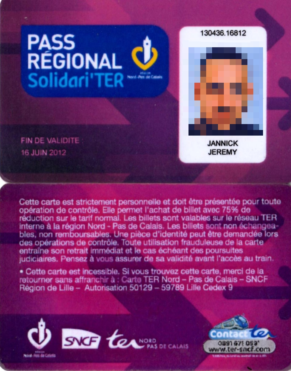 Pass Solidari'TER, alias carte chômeur, utilisée pour le TER Nord-Pas-de-Calais, notamment en 2011 et 2012. Elle a été remplacée par la Carte Pass Pass.